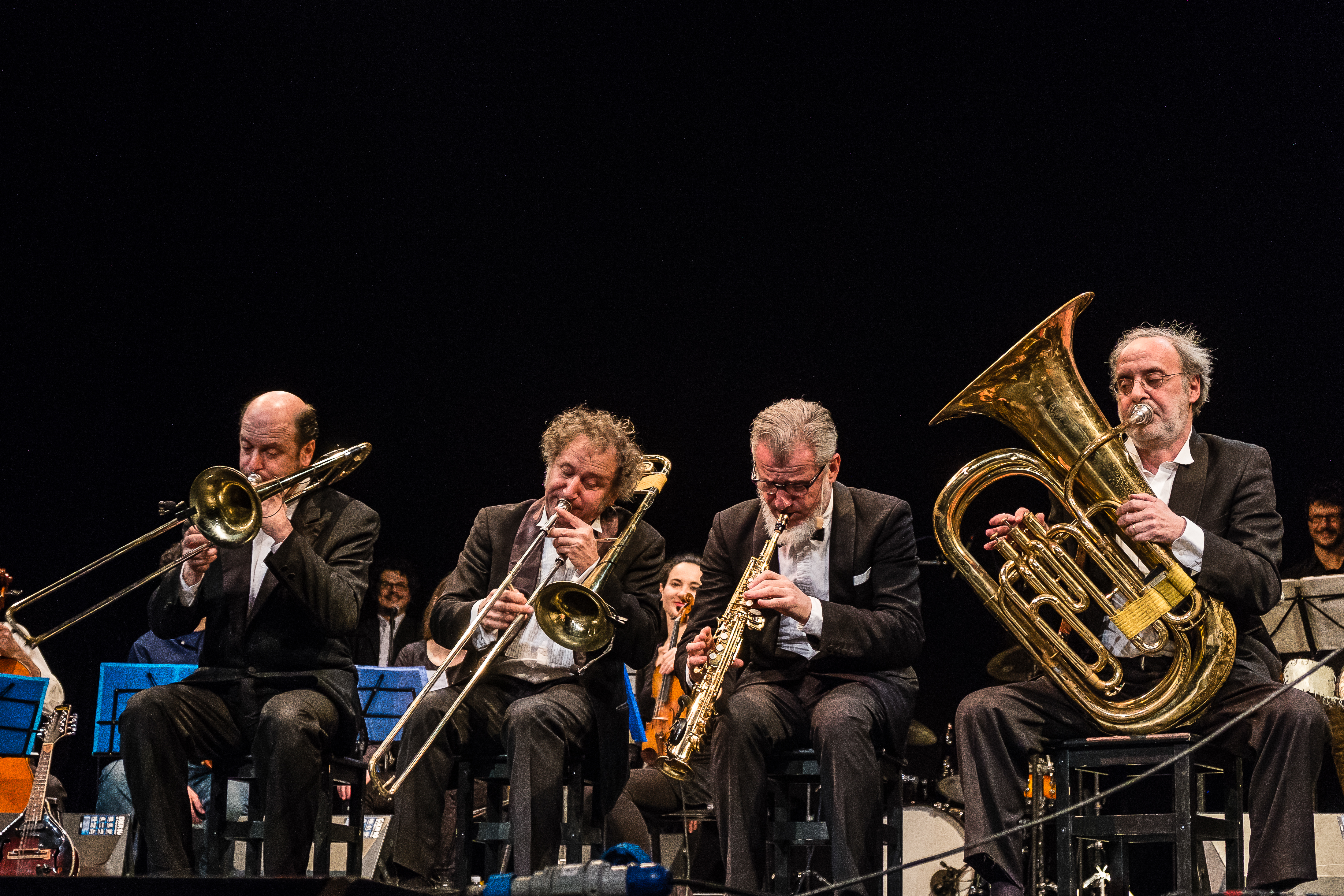 La Banda Osiris è un gruppo musicale italiano fondato a Vercelli nel 1980 dai fratelli Gianluigi e Roberto Carlone, da Giancarlo Macrì e Mario Sgotto.